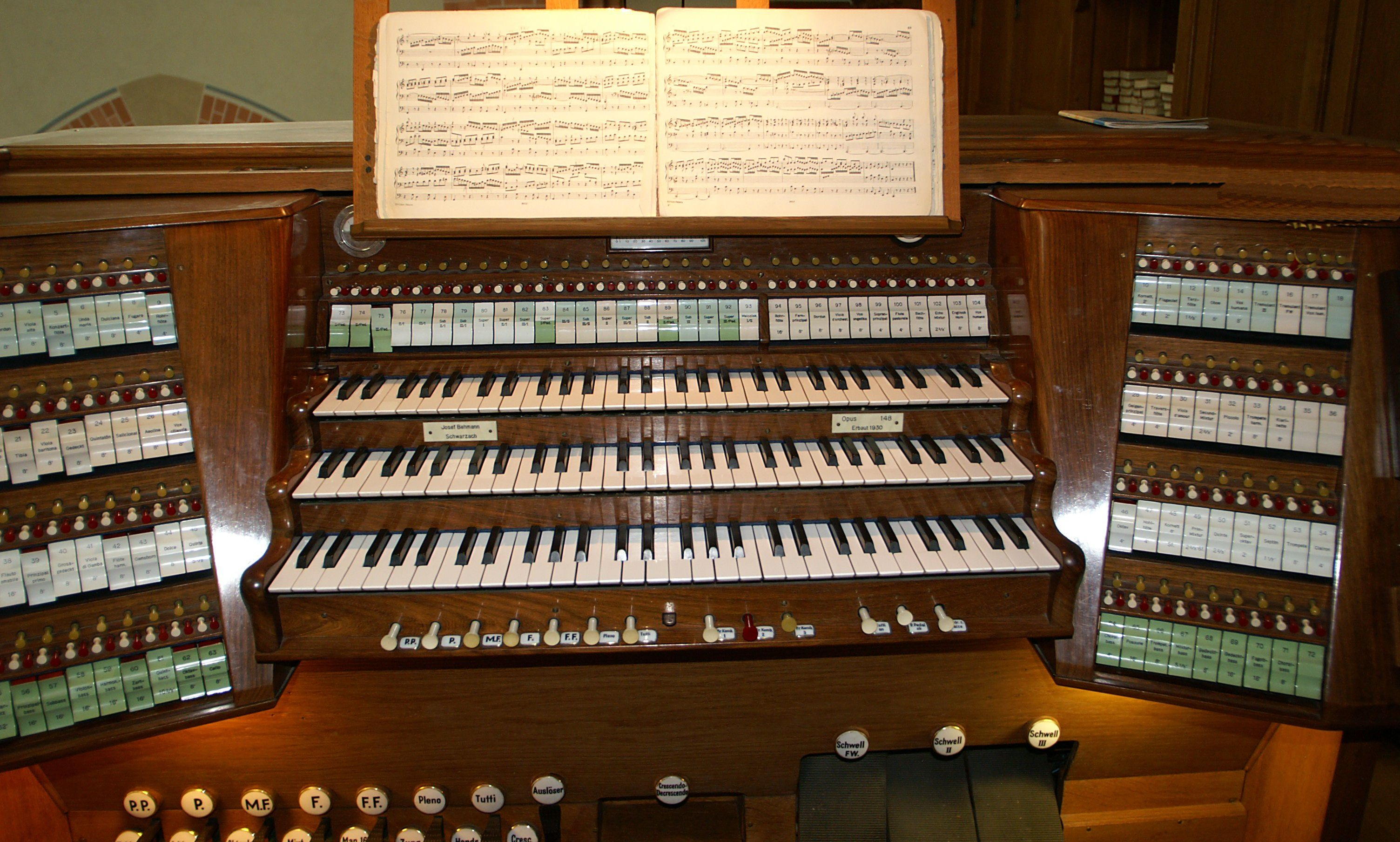 Herz-Jesu-Kirche in Bregenz. Orgelspieltisch. Notenblatt: Johann Sebastian Bach. Präludium und Fuge C-Dur BWV 547